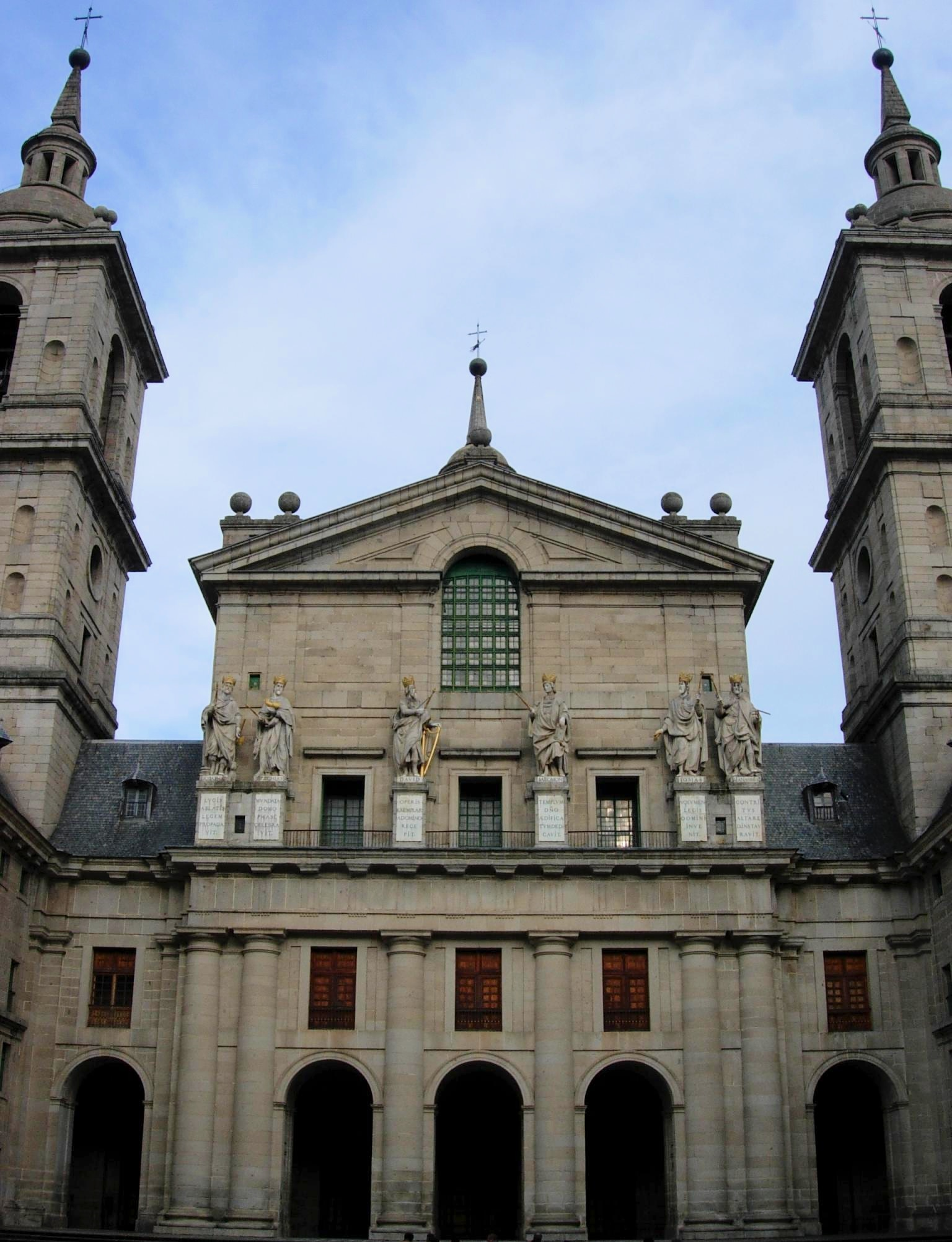 Fachada de la basílica del monasterio de El Escorial, en Madrid.